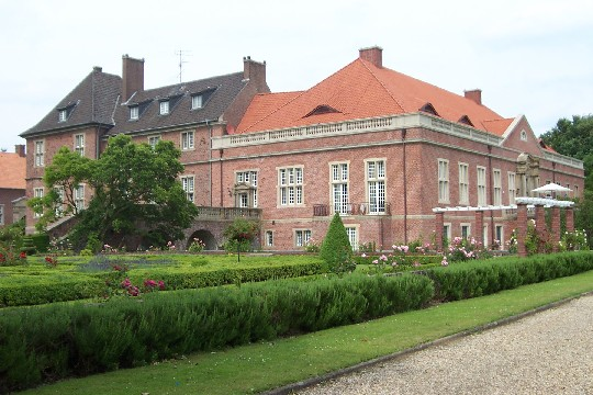 Ansicht von Schloss Kalbeck mit einem Teil der Gartenanlage